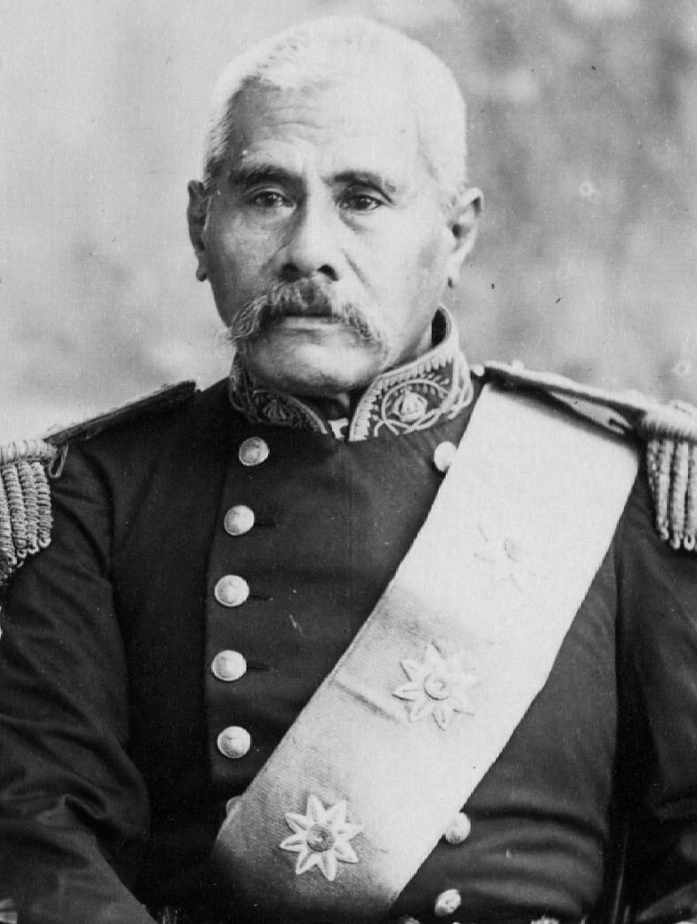 Malietoa Laupepa (1841-1898)